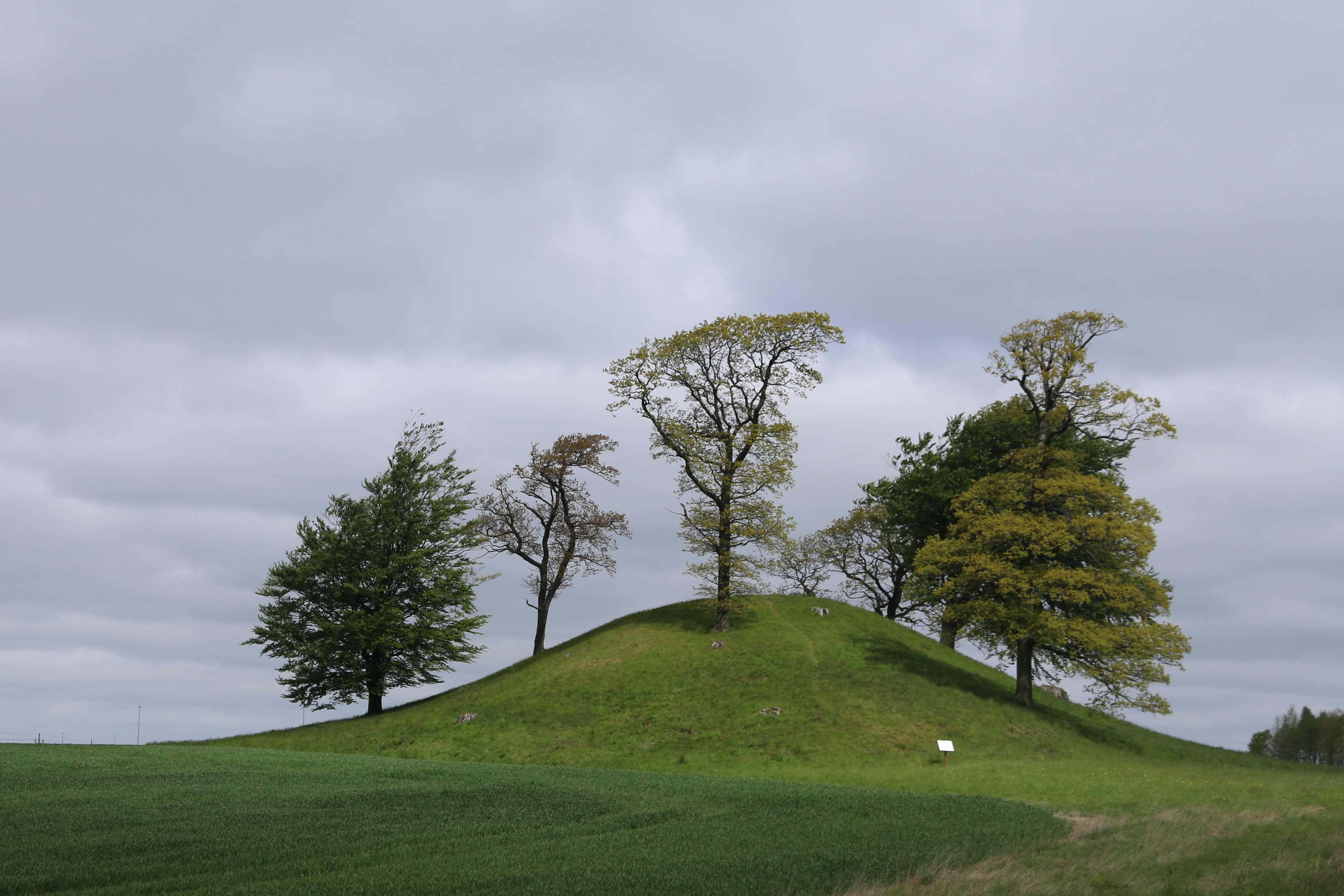 Ivars kulle norr om Halmstad